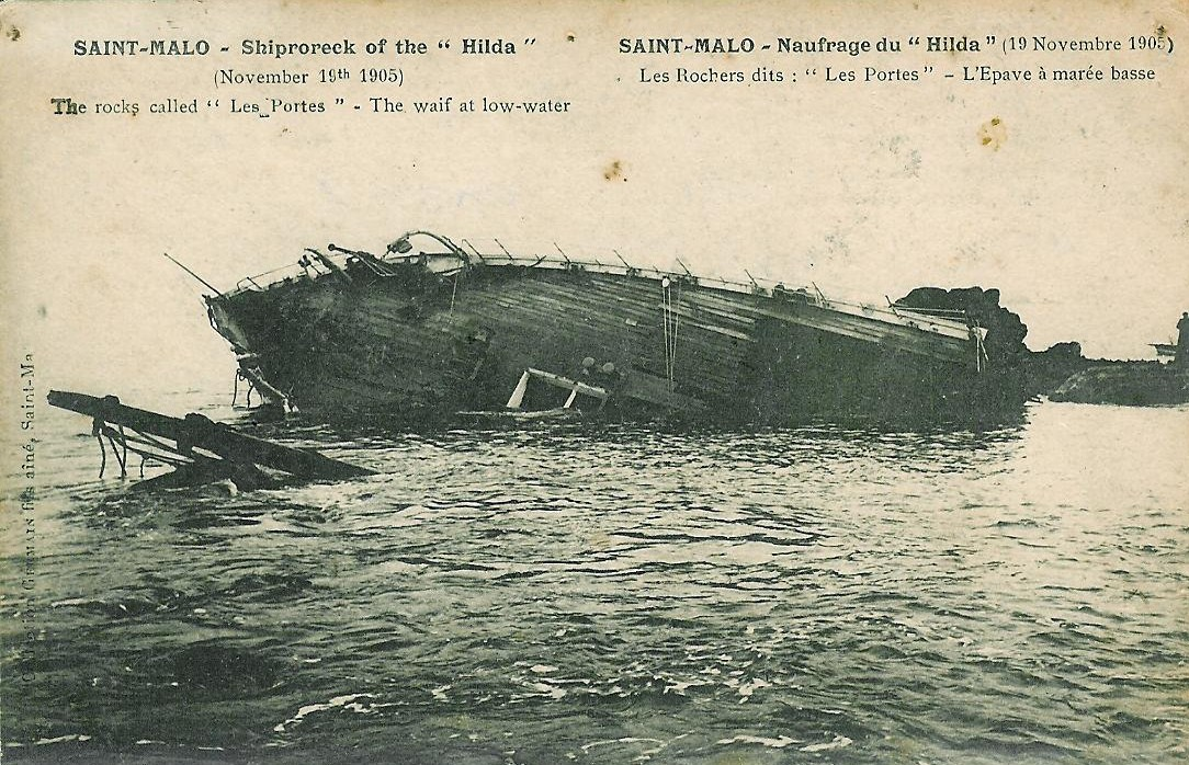 Nauvrage du bateau Hilda en 1905 à Saint-Malo.